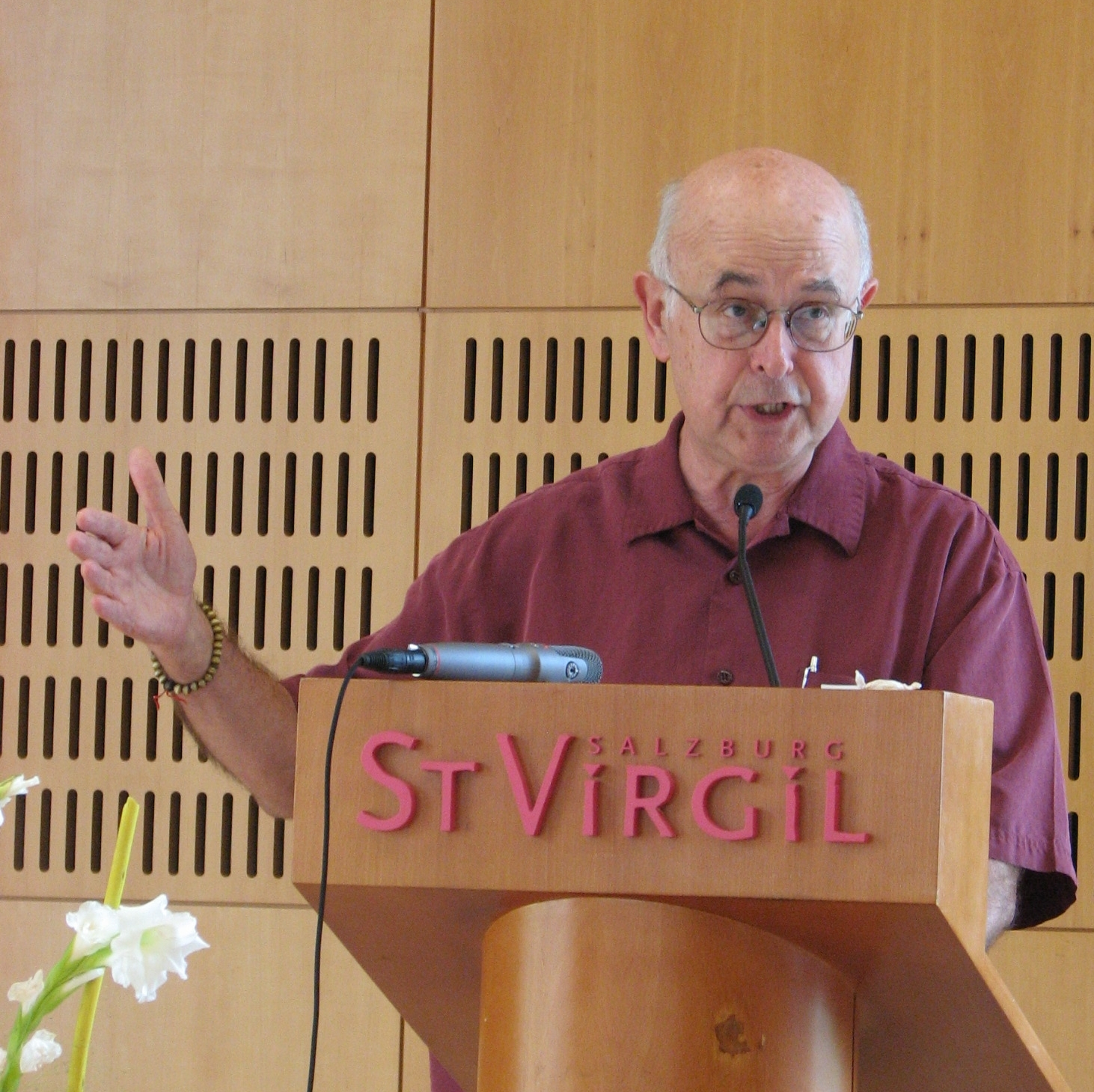 Prof. Knitter in Salzburg, Austria